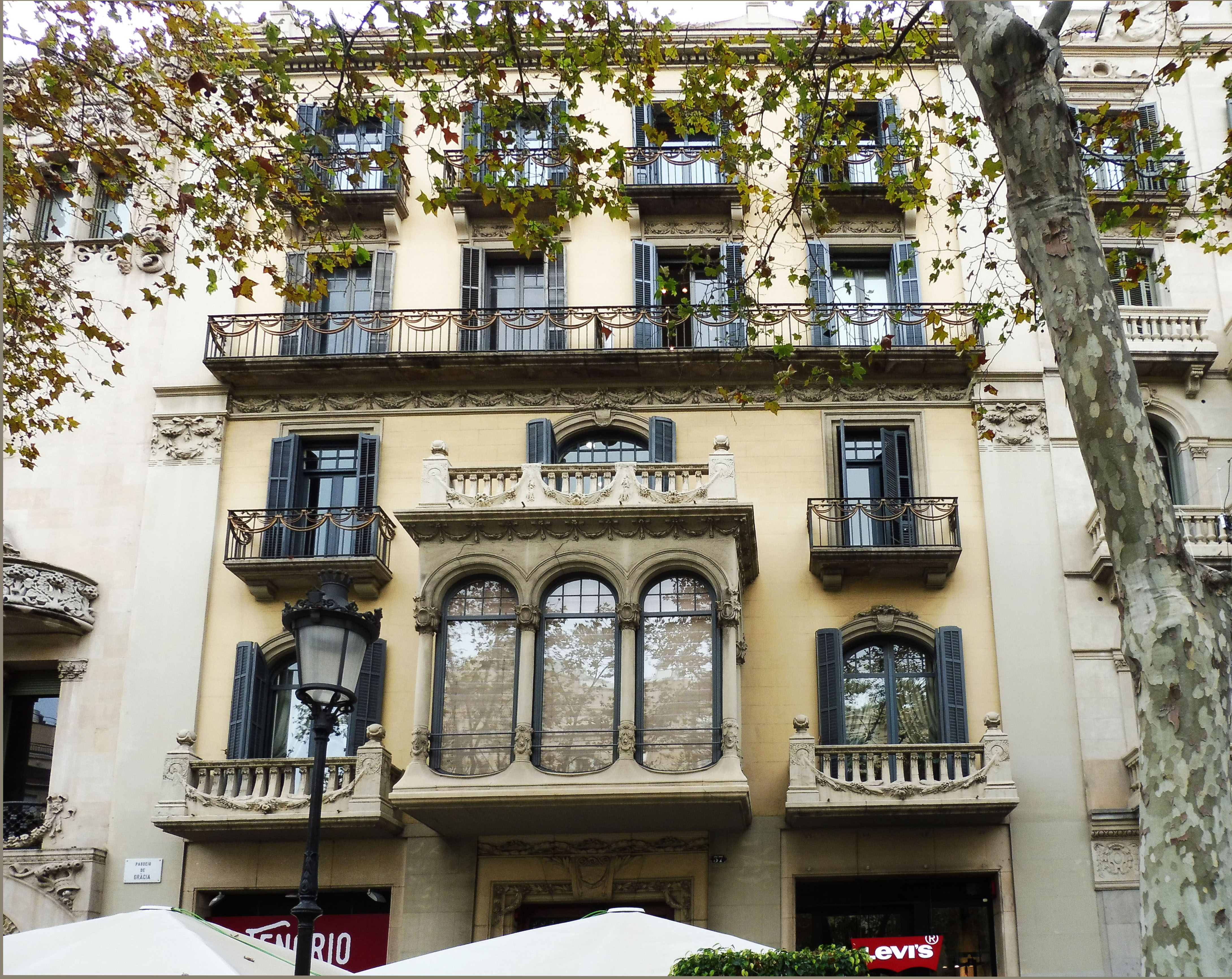 1896-Passeig de Gràcia 93-95 (avui Passeig de Gràcia 37). Comas (Ramon), propietari de la finxca. Queralt (Ramon), magatzem de pianos. 1904-Passeig de Gràcia 37. Comas Cañas (Ramon), propietari, viu als baixos, interior. 1906-Passeig de Gràcia 37. Ramon Mulleras encarrega a l'arquitecte Enric Sagnier Villavecchia la reforma de la casa Comas. Cercle Artístic de Barcelona, exposició de quadres a l'oli. Comas (fills de Ramon), propietaris. Estalella (Ramon), advocat. Grau Martí (Eusebi), metge. Imber (Joan), recaptador de la Duana. Vila Teixidor (Francesc Xavier), advocat. 1915-Passeig de Gràcia 37. Cercle de Belles Arts. Canal Soler (Melció), notari, 2º 1ª. Vidal Quadras (Teresa), propietària en el principal. 1930-Passeig de Gràcia 37. Canal Soler (Melció), notari, 2º 1ª. Parès Bartra (Josep Mª), advocat, 3r 2ª. Segura, magatzems de novetats, merceria, confecció i modes. Vidal Quadras (Teresa), propietària, principal. 1948-Passeig de Gràcia 37. Aimat (Josep Mª), advocat i magatzem de rellotges, principal. Navas Escuder (Josep), armador de vaixells. Pascual Castan (Ernest), periodista, 3r 2ª. Segura Stat. Anònima, (J.E.), merceria, confecció i modes. 1961-Passeig de Gràcia 37. Lineas Marítimas Italianas, en el principal. MAPFRE, compañia de seguros. Pascual Castan (Ernest), advocat, en el 3r 2ª. Pascual Segarra (Enric), metge. Pascual Segarra (Ernest), advocat. SAEMAR, consignatari de vaixells. Segura Sdad. Anónima (J.E.), merceria, confecció i articles de pell. 2016-Passeig de Gràcia 37. Levi's, sastreria. Tenorio, braseria.